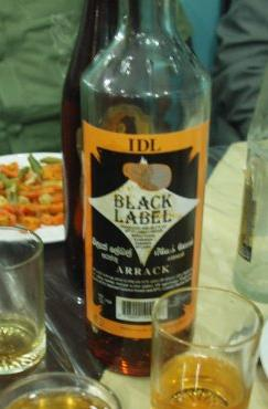 Arak